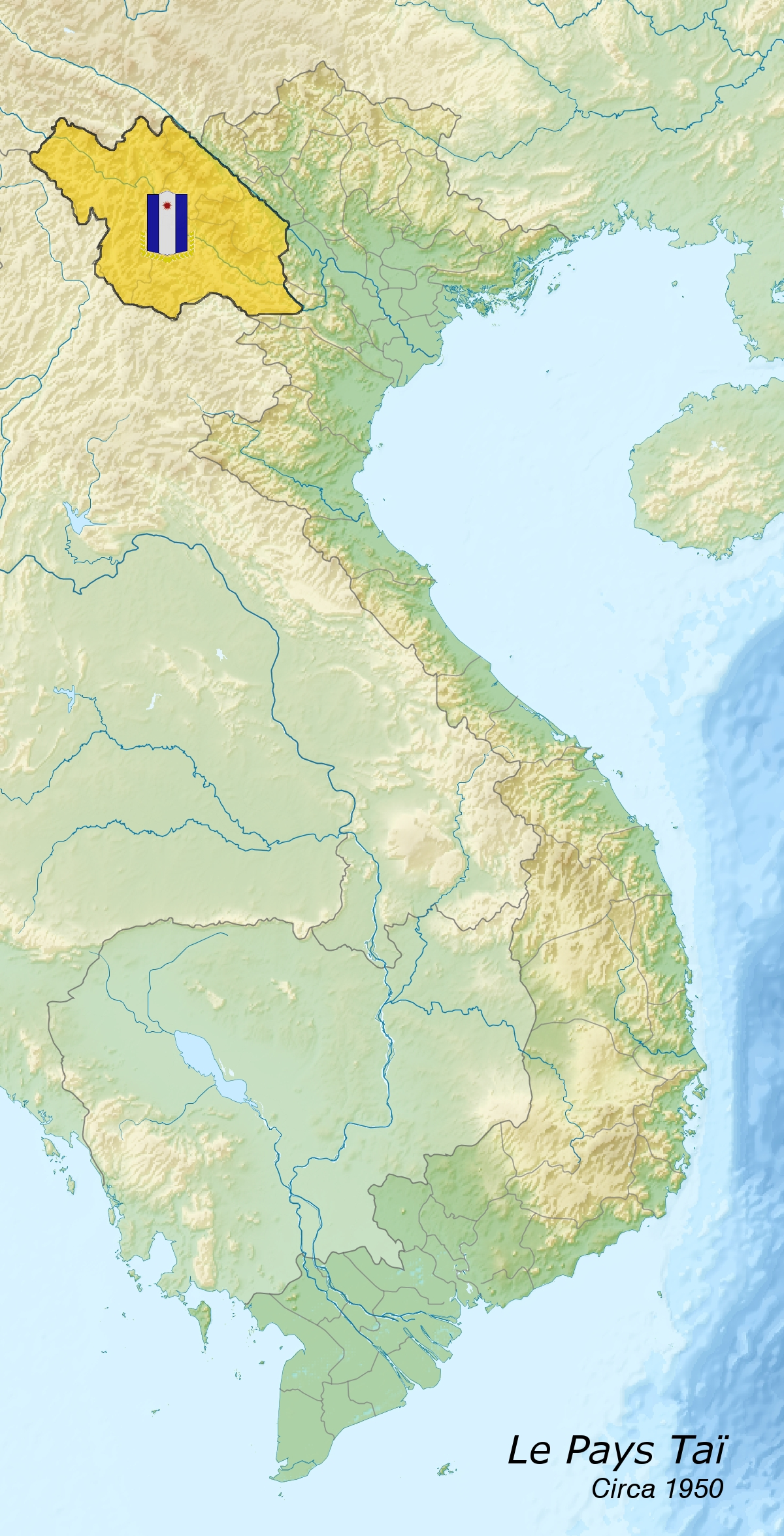 Le Pays Taï / Taï/Tai Country - Situation en 1954 (Président du Pays Taï : Deo Van Long)